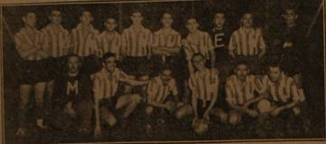 Equipo de Unión que le gano a La Maquína de River Plate